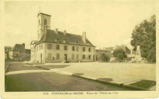 Place de l'Hôtel de ville, Pontailler-sur-Saône, Côte d'Or (21), 1923: église Saint Martin en arrière-plan, monument aux morts à droite.